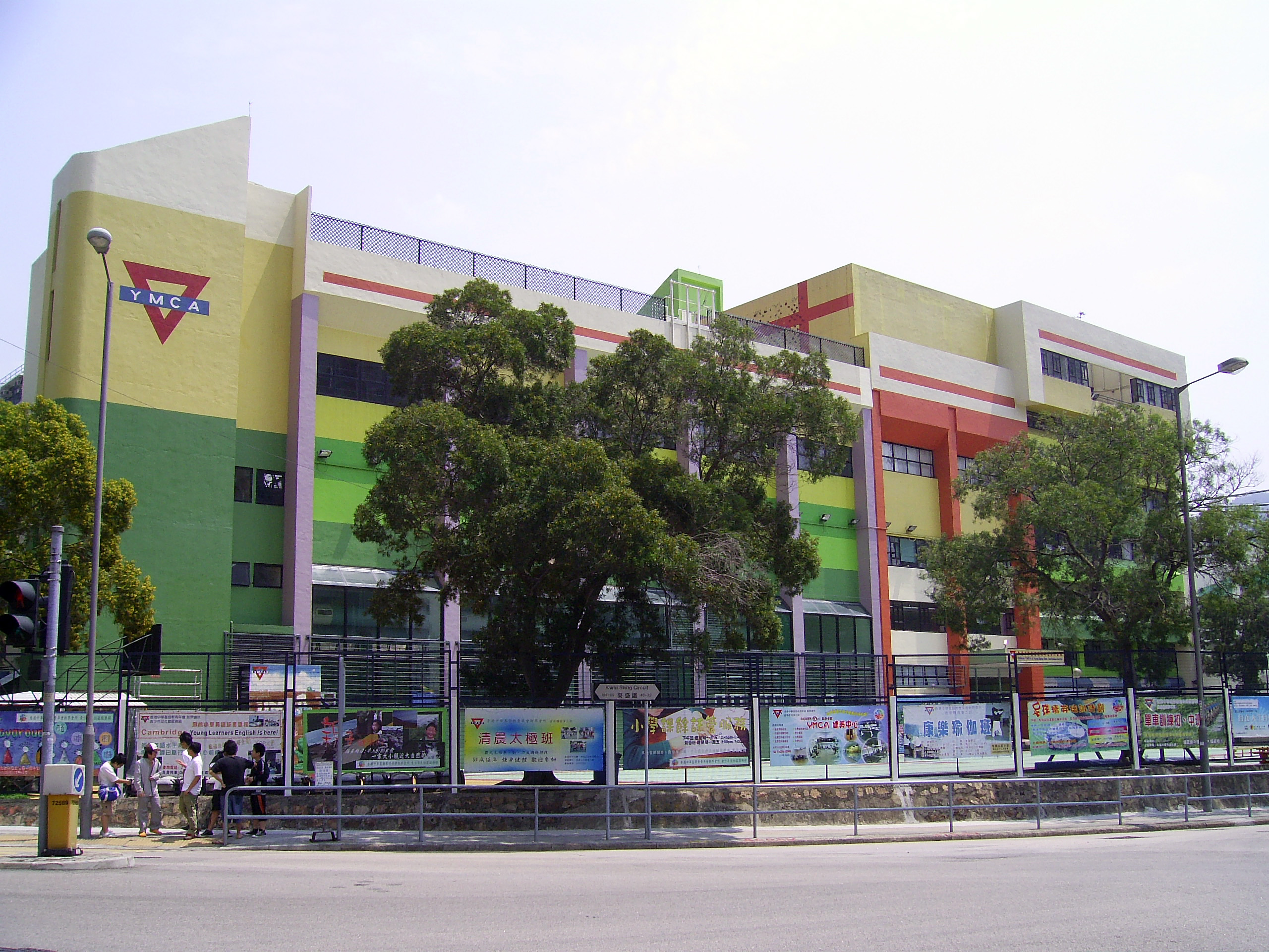 中文（香港）: 香港中華基督教青年會新界會所